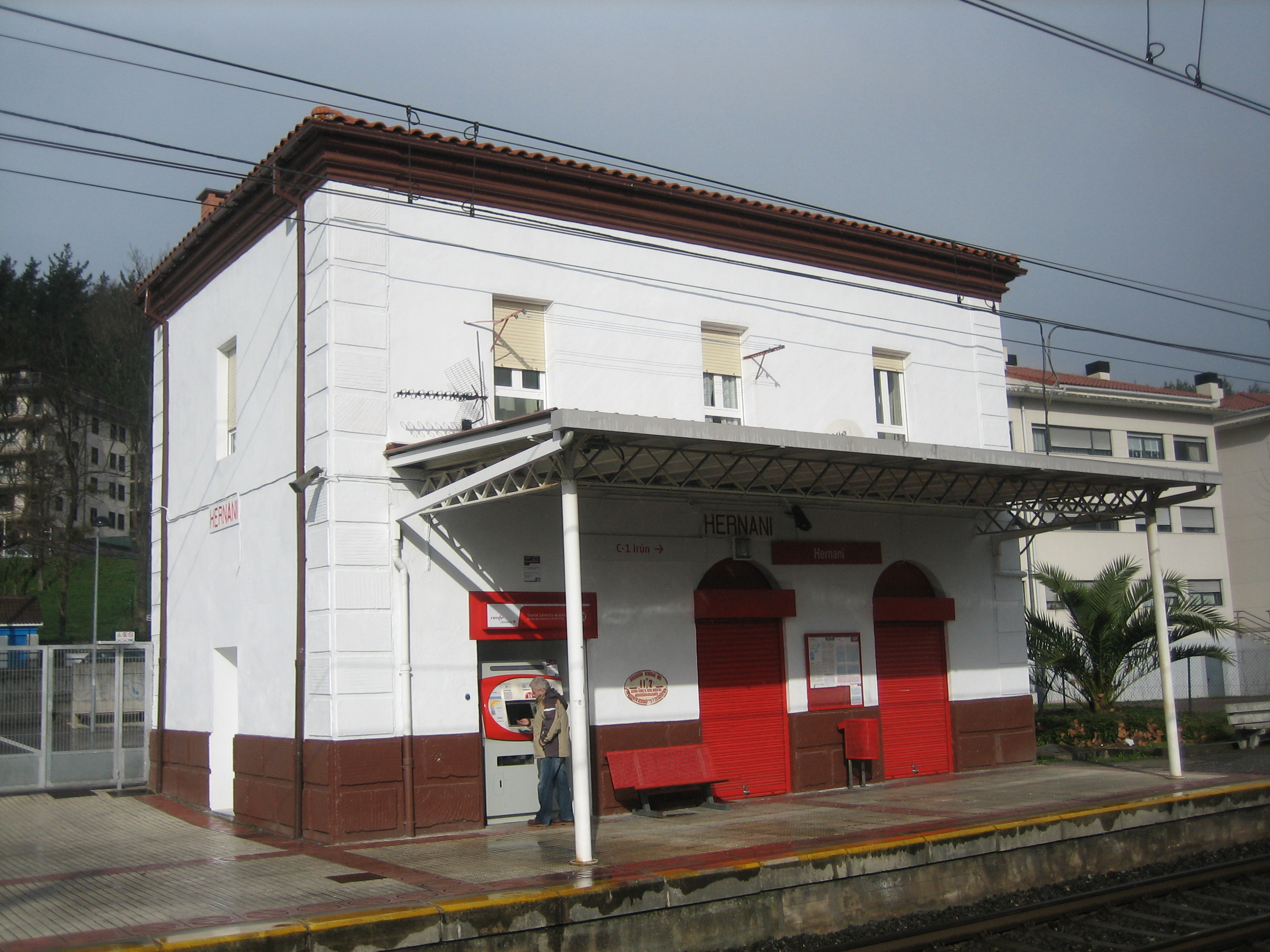 Edificio para viajeros de la estación